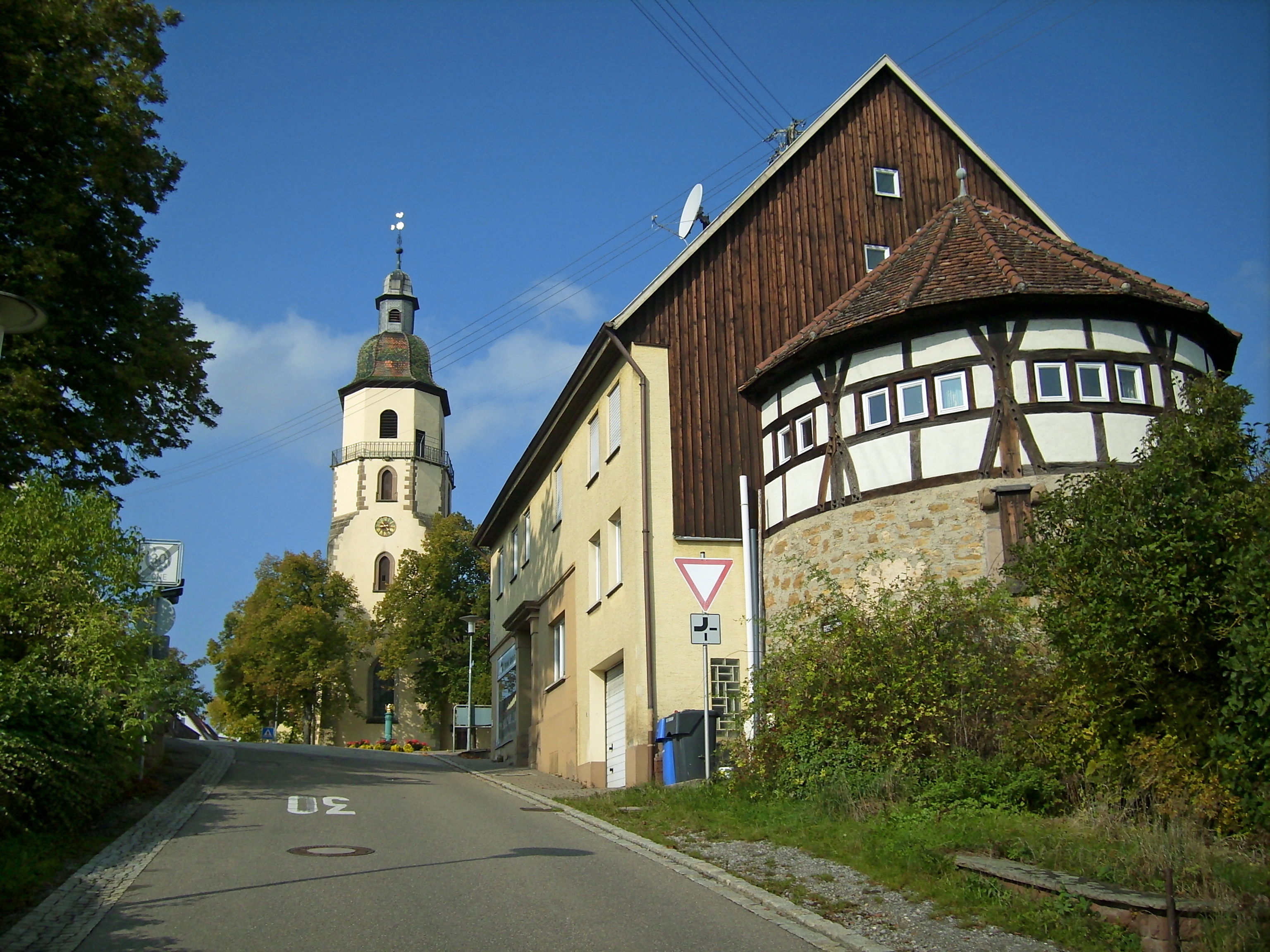 Rosenfeld Einer der beiden Tortürme des östlichen Stadtzugangs der 1832 abgebrochenen Toranlage - OpenStreetMap (Info)